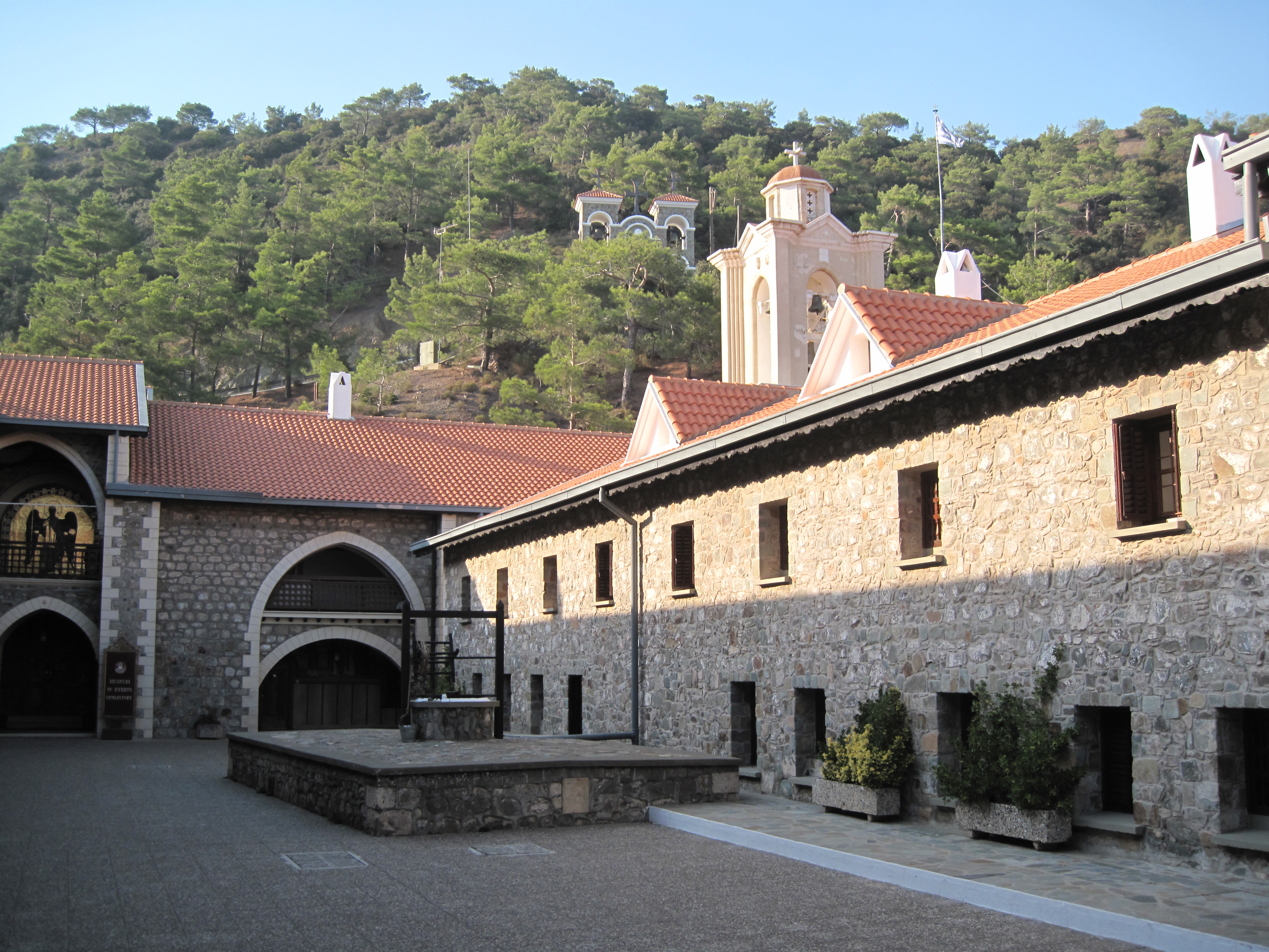 Kýkko-klooster